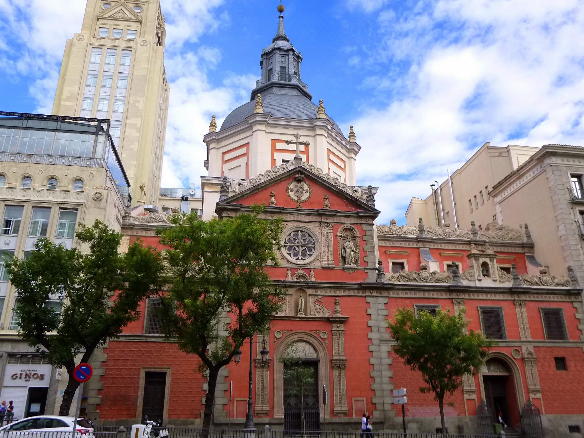 Iglesia de la Concepción Real de Calatrava (Madrid)